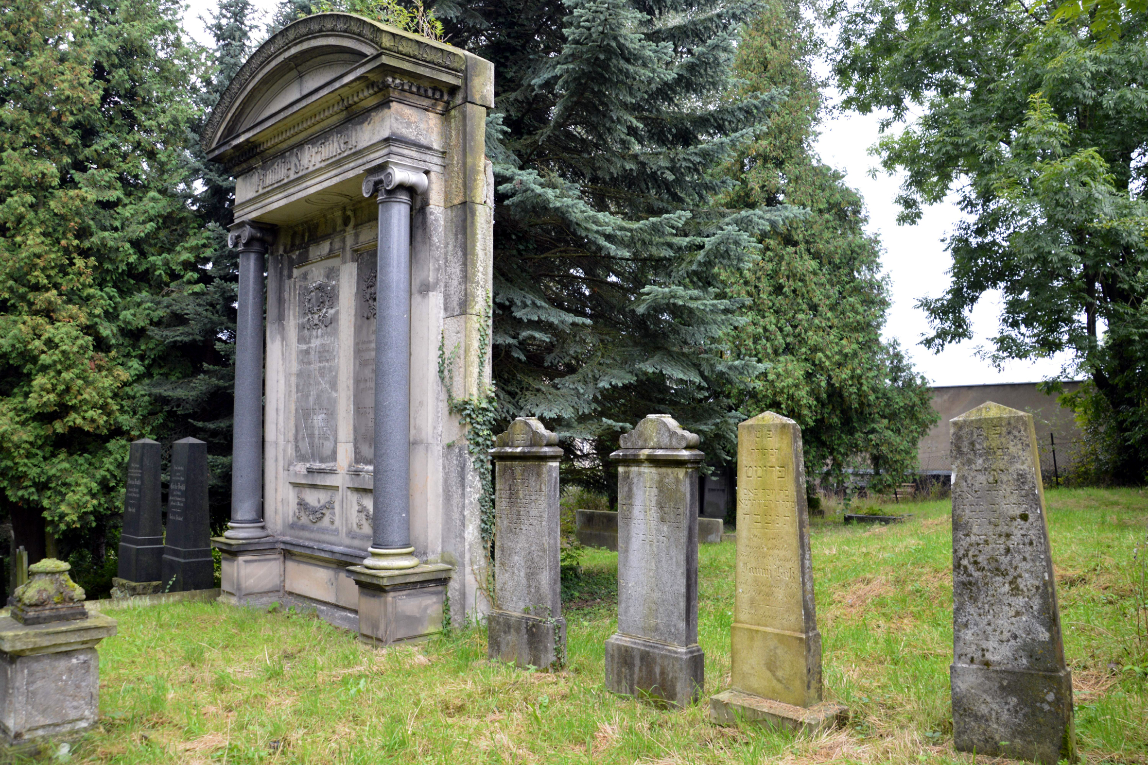 Prudnik, cmentarz żydowski, k. XIX 03.1977.